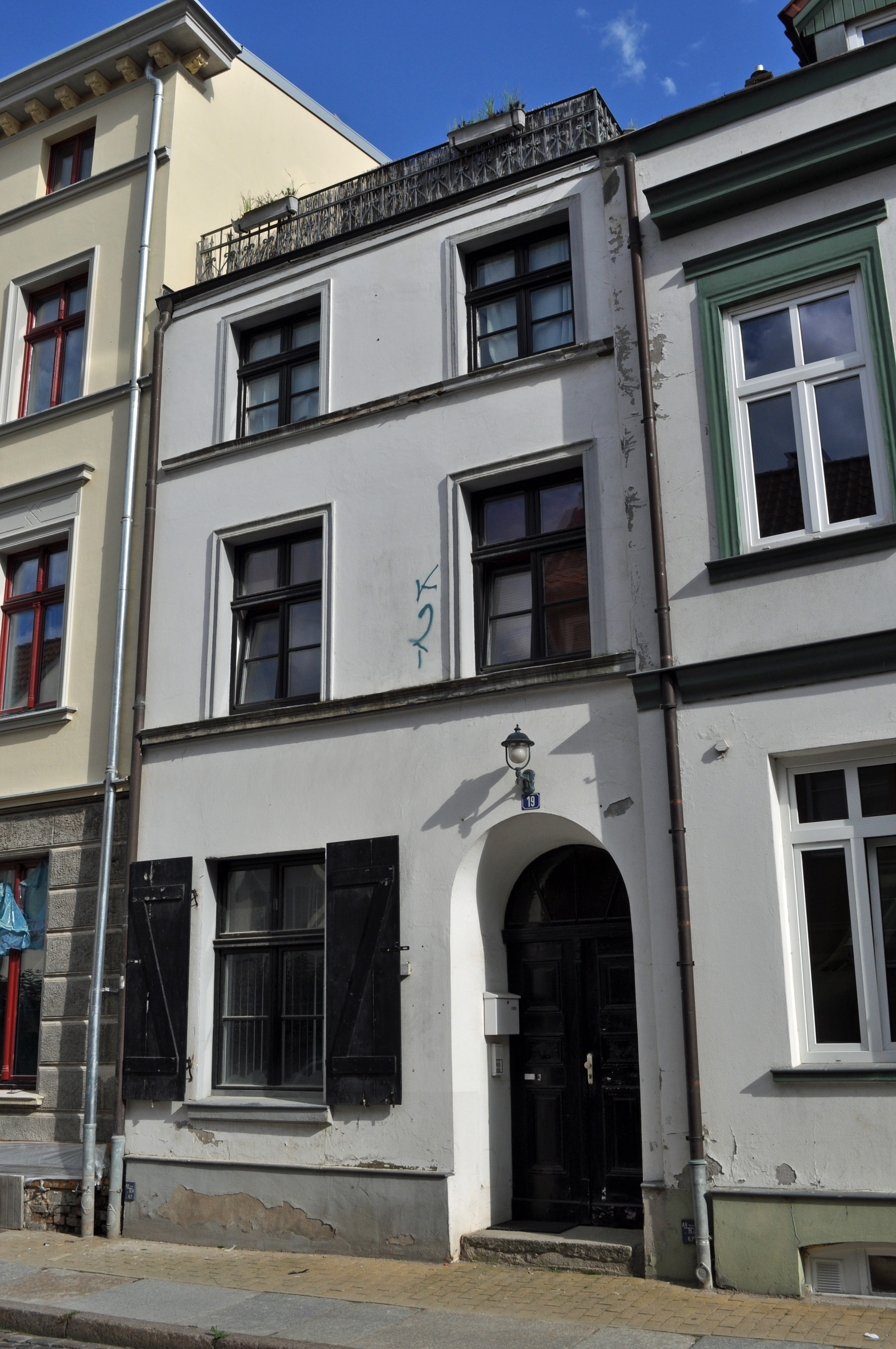 Das Foto zeigt ein Haus (bzw. Details des Hauses) in der Frankenstraße in Stralsund, Deutschland. Die Hausnummer steht im Dateinamen. Aufgenommen am 19. Juli 2011 vom Benutzer:Klugschnacker.